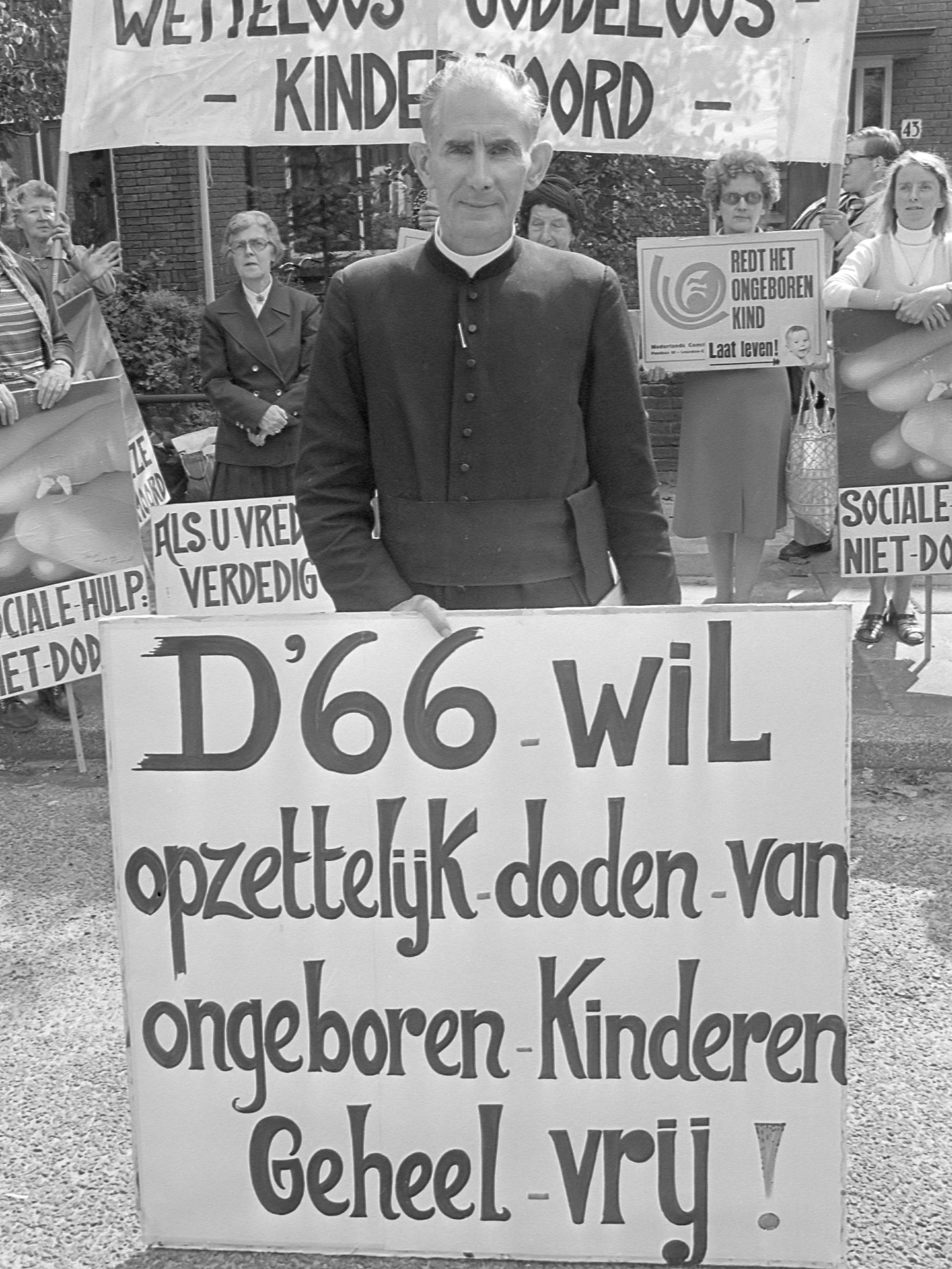 Pater Koopmans demonstreert voor huis D66 Tweede Kamer lid mevrouw Wessel 30 augustus 1977